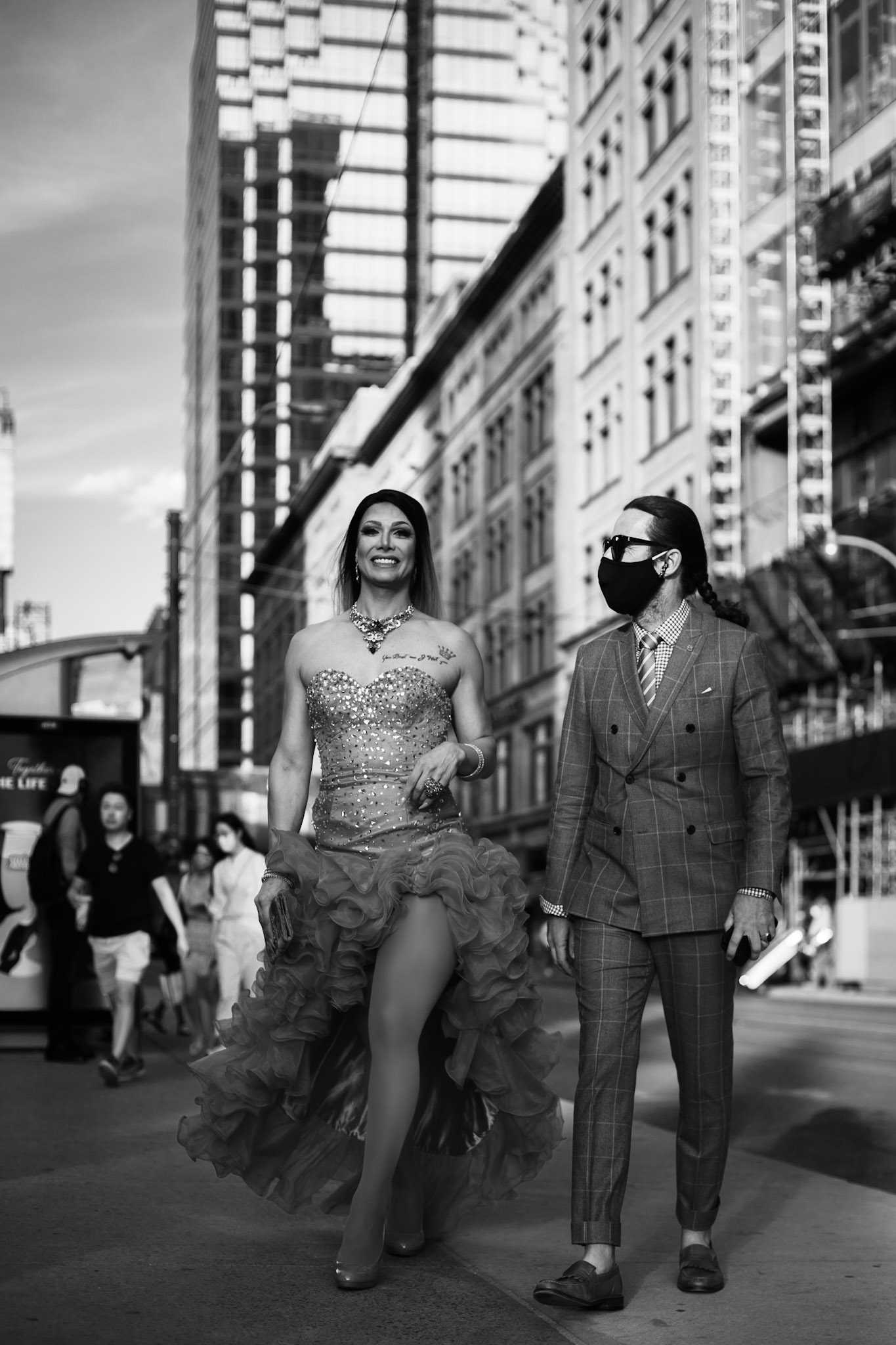 این عکس توسط پوریا افخمی در خیابان های تورنتو ثبت شده است.